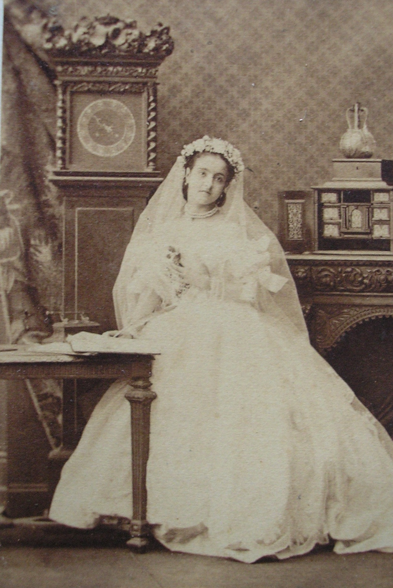 Adelina PattiOther side: File:Ismaël, Adelina Patti, verso.jpg